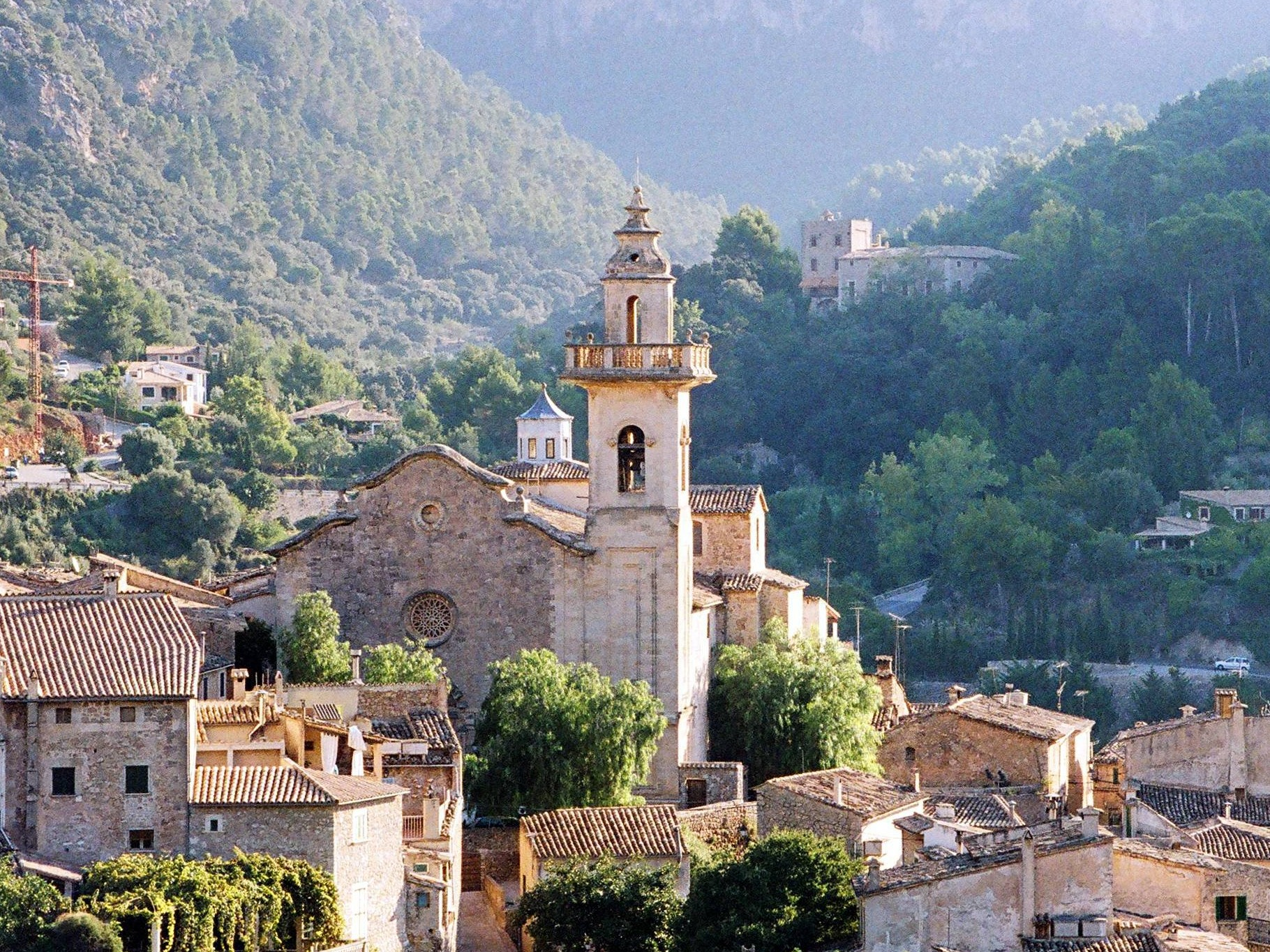 Valldemossa, Ort an der Westküste der Baleareninsel Mallorca, im Zentrum die Pfarrkirche Sant Bartomeu („Sankt Bartholomäus“)